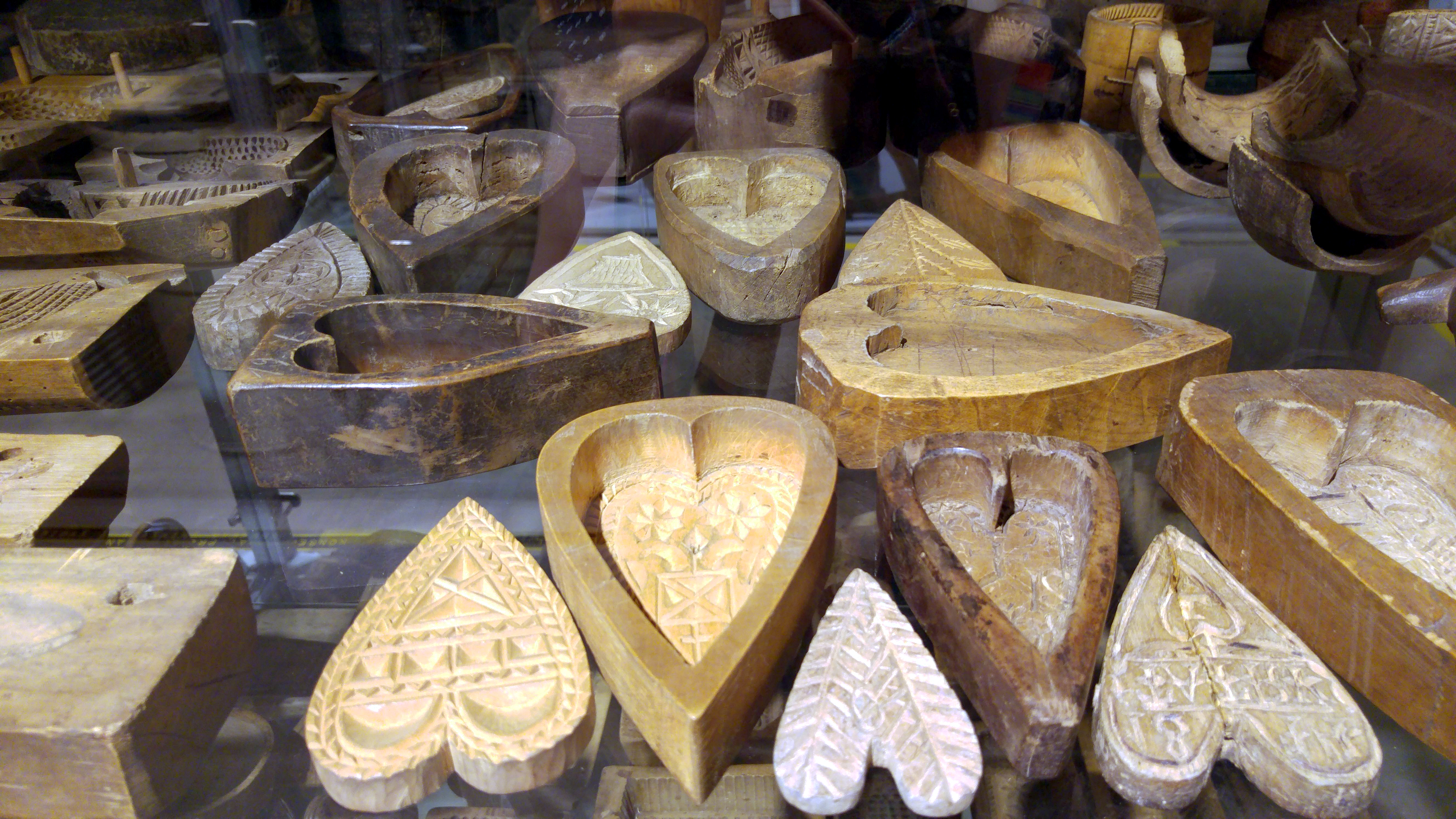 Formy do góralskich serów. Porządek rzeczy. Magazyn Piotra B. Szackiego - wystawa stała, Państwowe Muzeum Etnograficzne w Warszawie